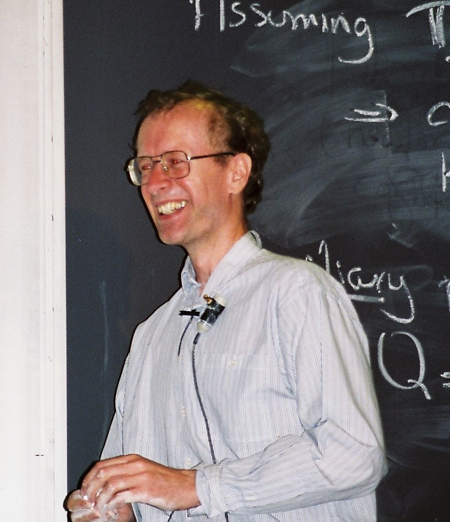 Andrew Wiles 1995 bei einer Tagung in Boston